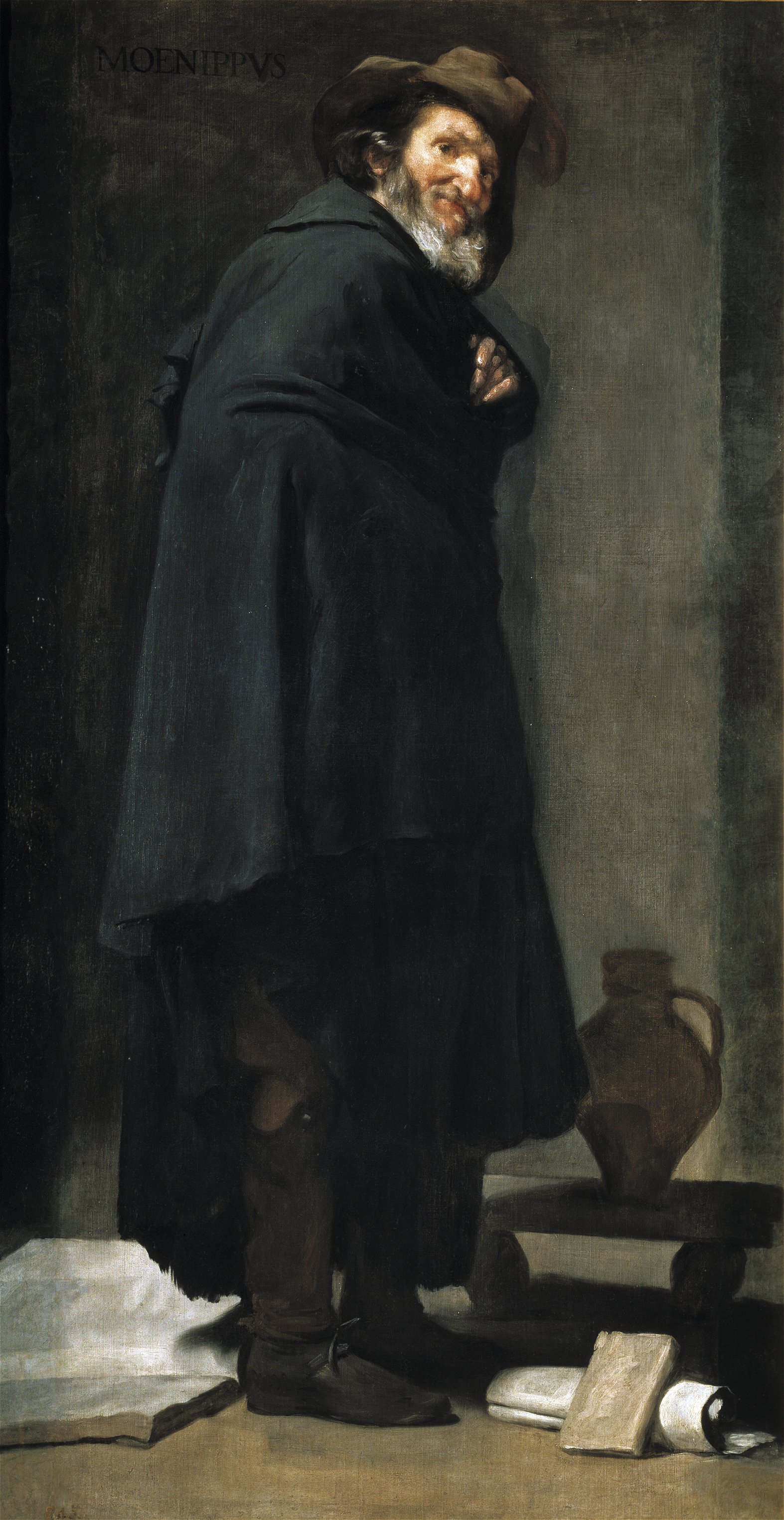 La obra representa al filósofo y escritor griego Menipo de Gadara, y fue ejecutada por el pintor sevillano Diego Velázquez hacia 1638.